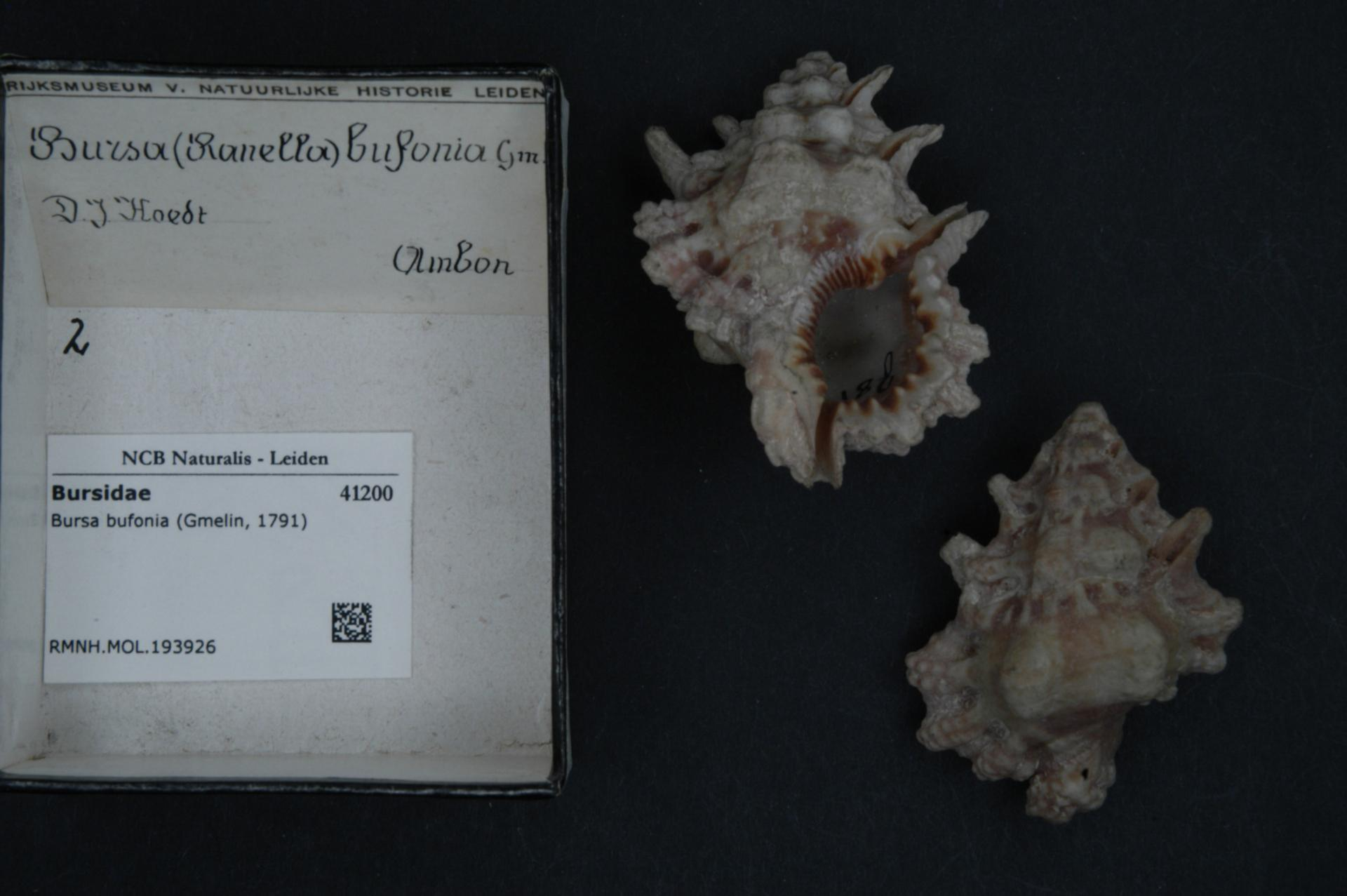 Bursa bufonia (Gmelin, 1791)